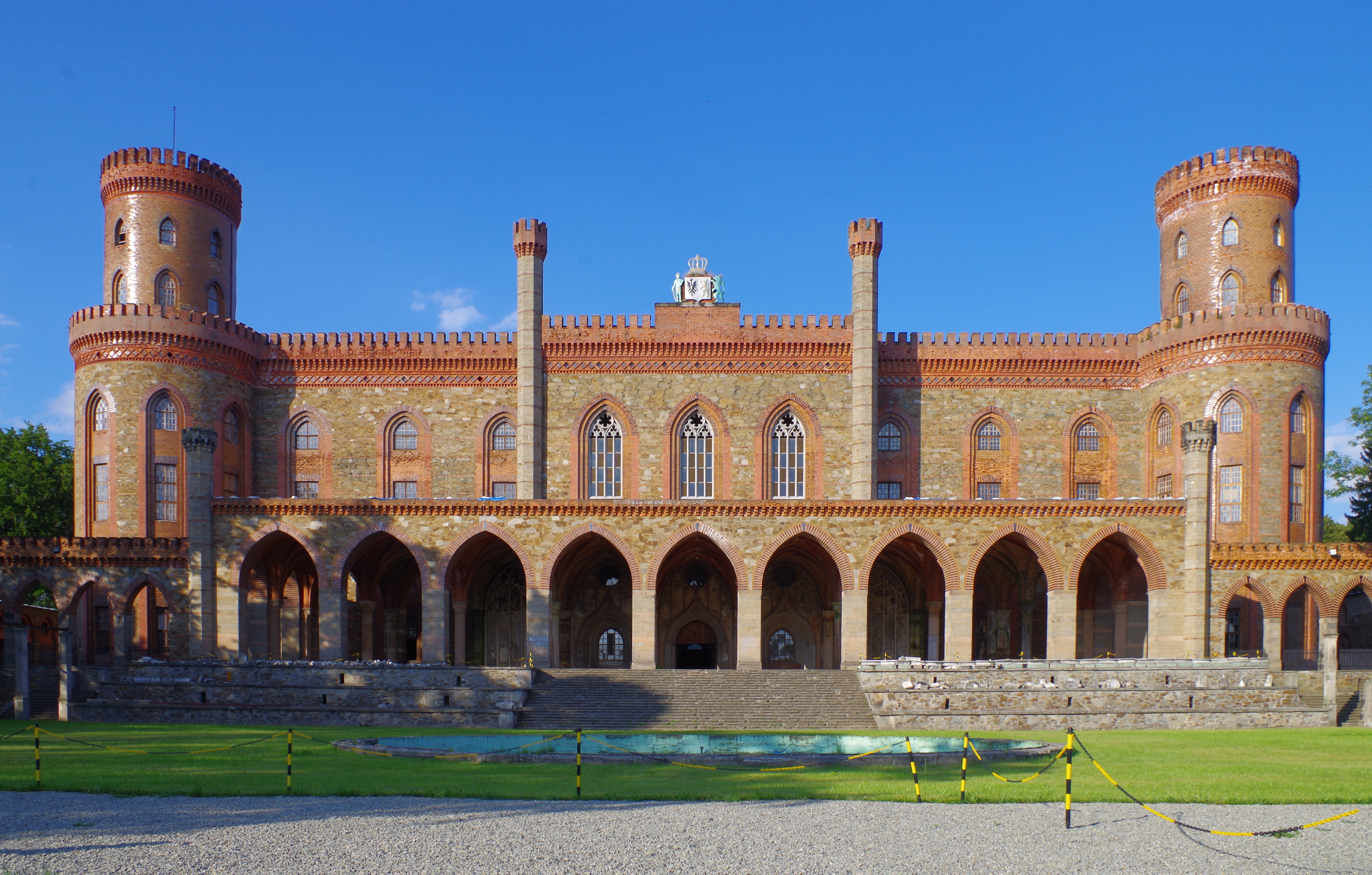 Kamieniec Ząbkowicki, zespół zamkowy, 2 poł. XIX